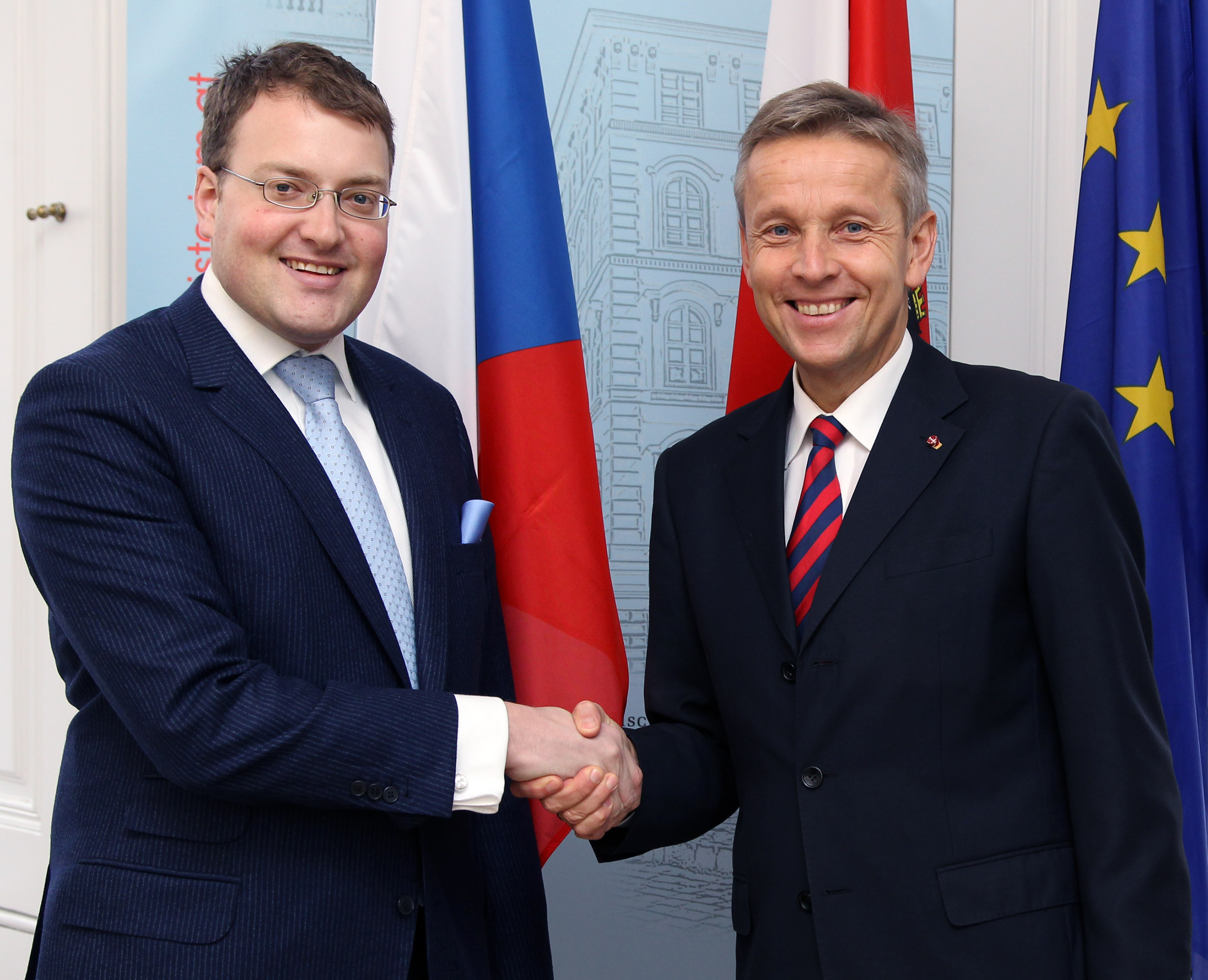 Staatssekretär Lopatka trifft den tschechischen EU Staatssekretär Belling : Foto: Mahmoud